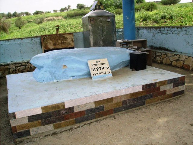 קבר התנא רבי אלעזר בן עזריה